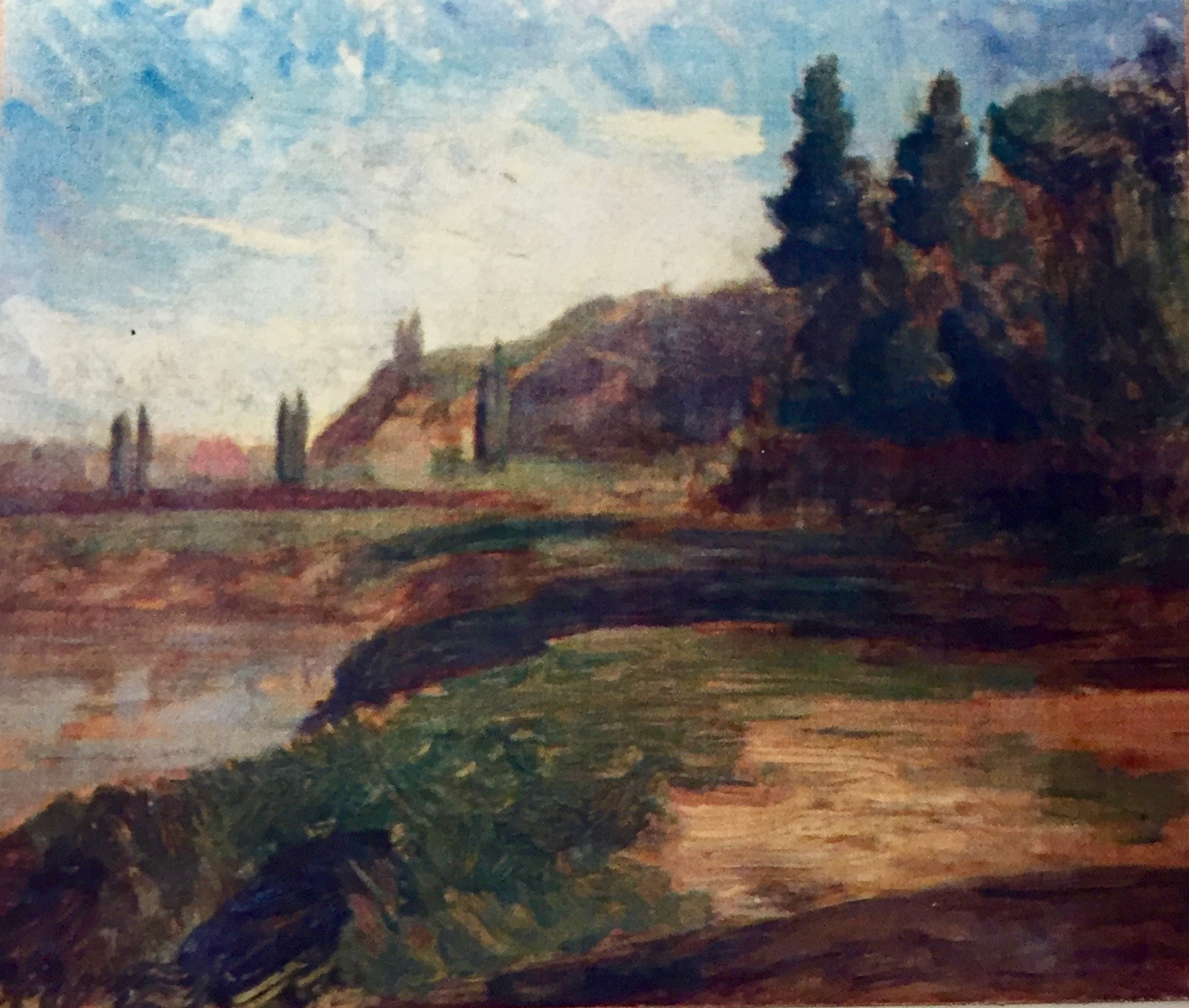 Joseph Trévoux, Huile sur toile marouflée sur carton, 26 cm x 30,5 cm, Montbrison (Loire), coll.part.